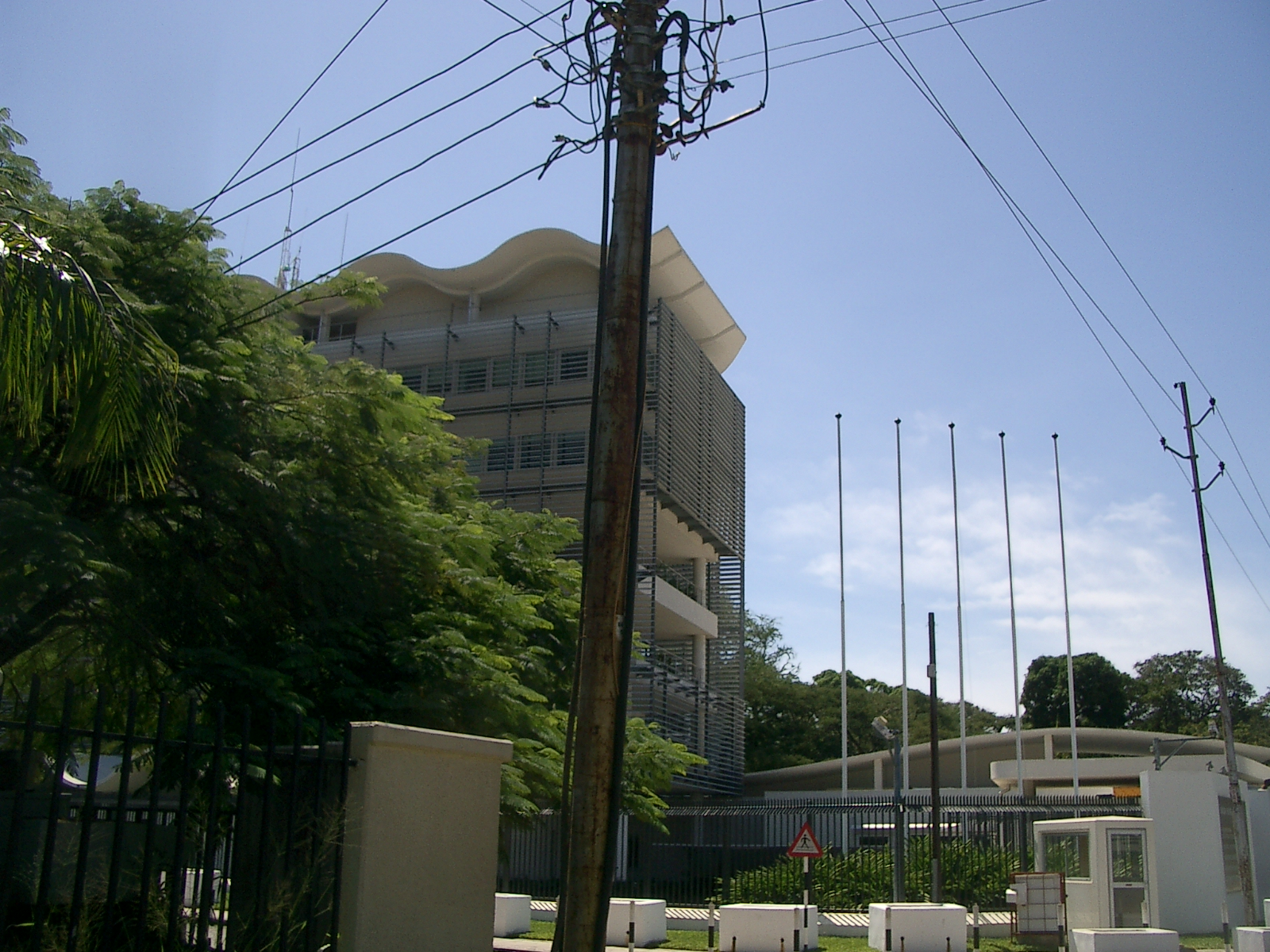 Deutsche Botschaft in Tansania - German Embassy Tanzania